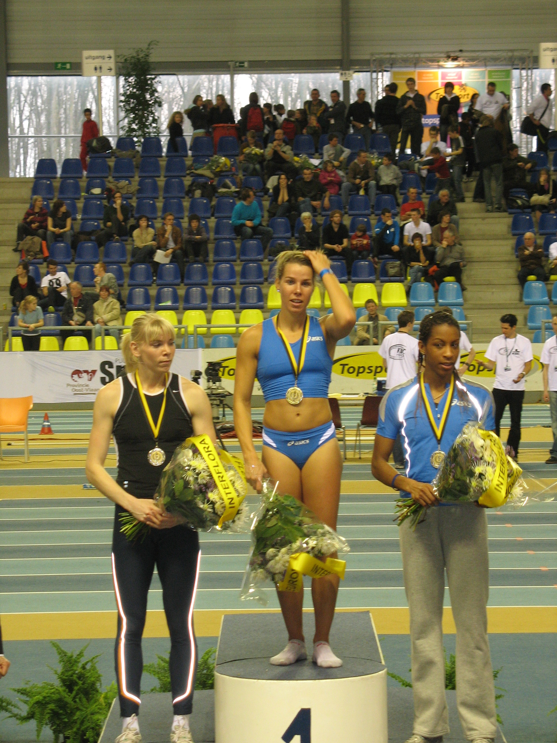 Hanna Marien op het podium op de KBC Indoor 2008